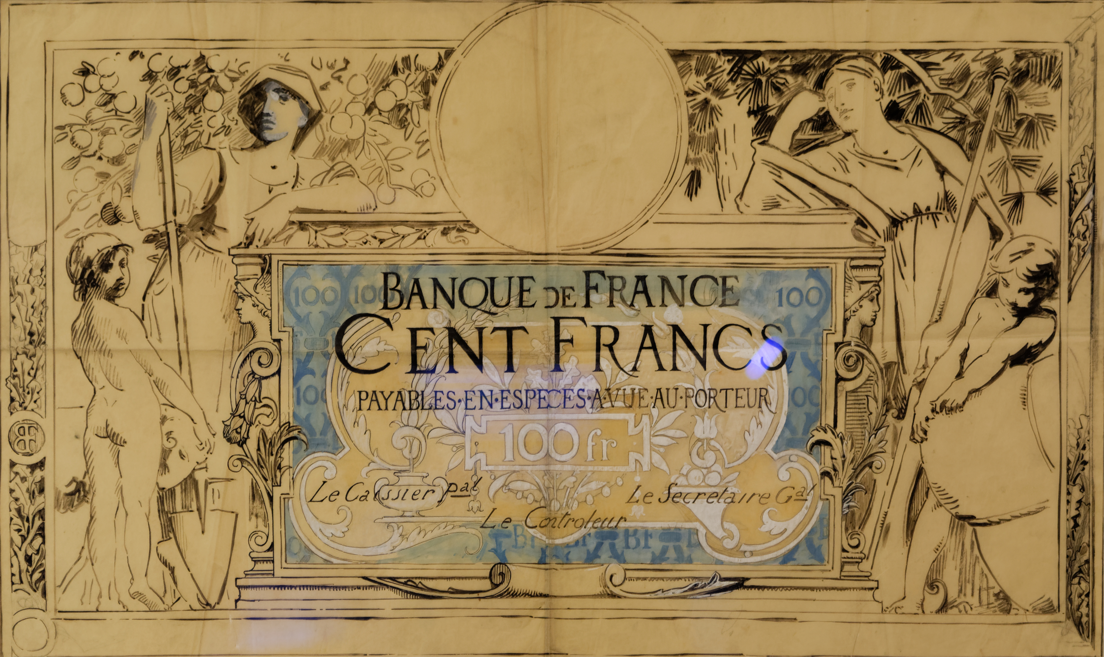 Luc-Olivier Merson - Banque de France : Cent francs. Exposition "Luc-Olivier Merson illustrateur et décorateur" au Musée d'arts de Nantes (16 mars - 17 juin 2018). Crayon, pierre noire, plume, encre et gouache sur papier calque. 1906